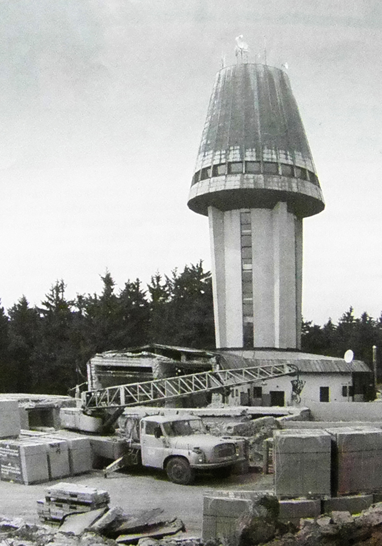 Suchý vrch - stavba hotelu